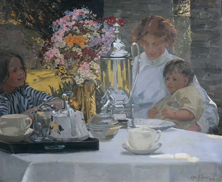 La fiesta del té - óleo sobre lienzo - Alto: 54,6 cm - Ancho: 66cm -Tate